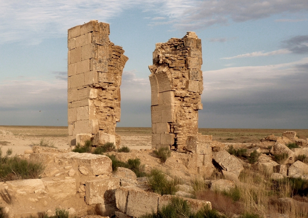 Архитектурный комплекст XIV века Белеули